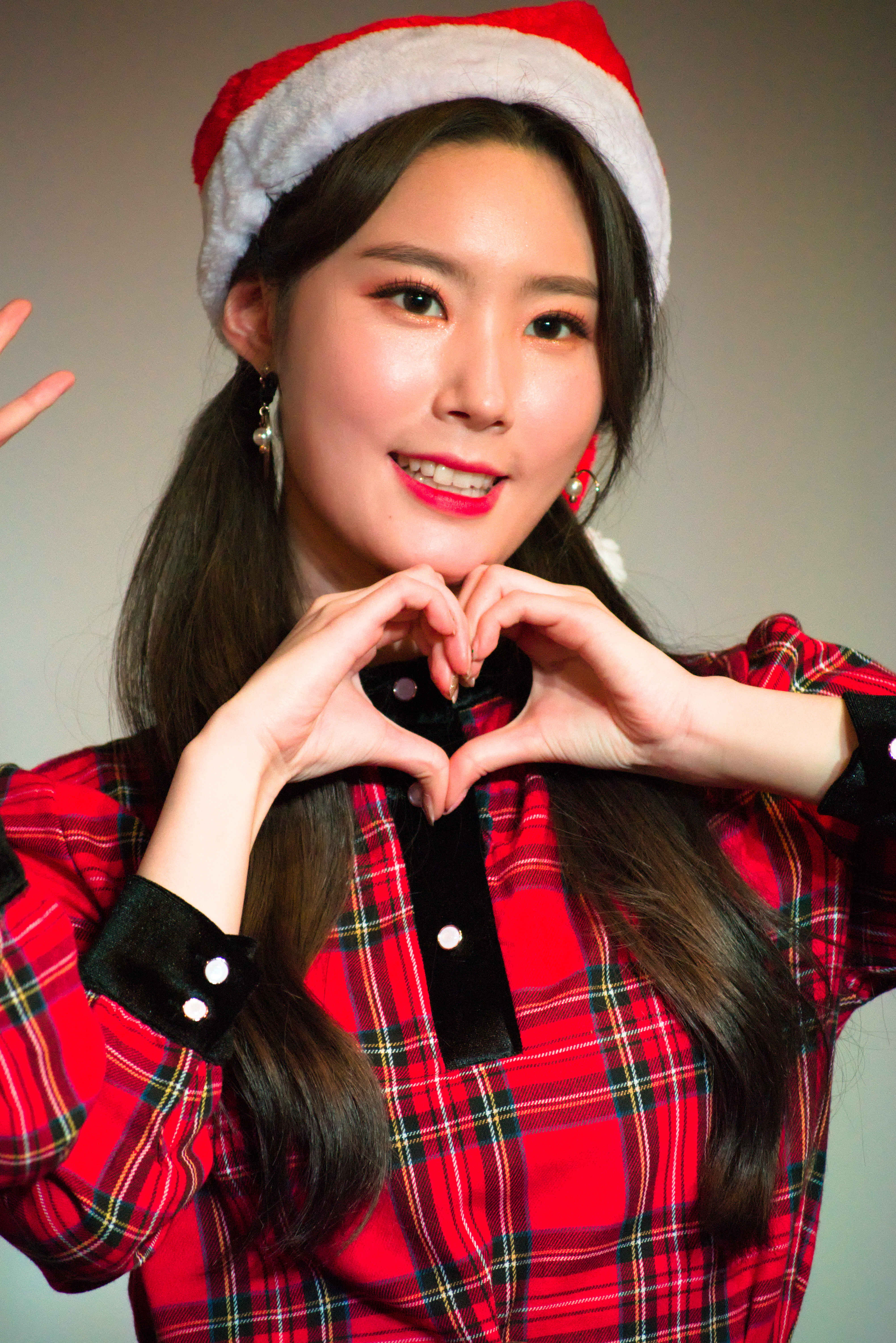 S.I.S CHRISTMAS CONCERT 20181225 2部 ミンジ